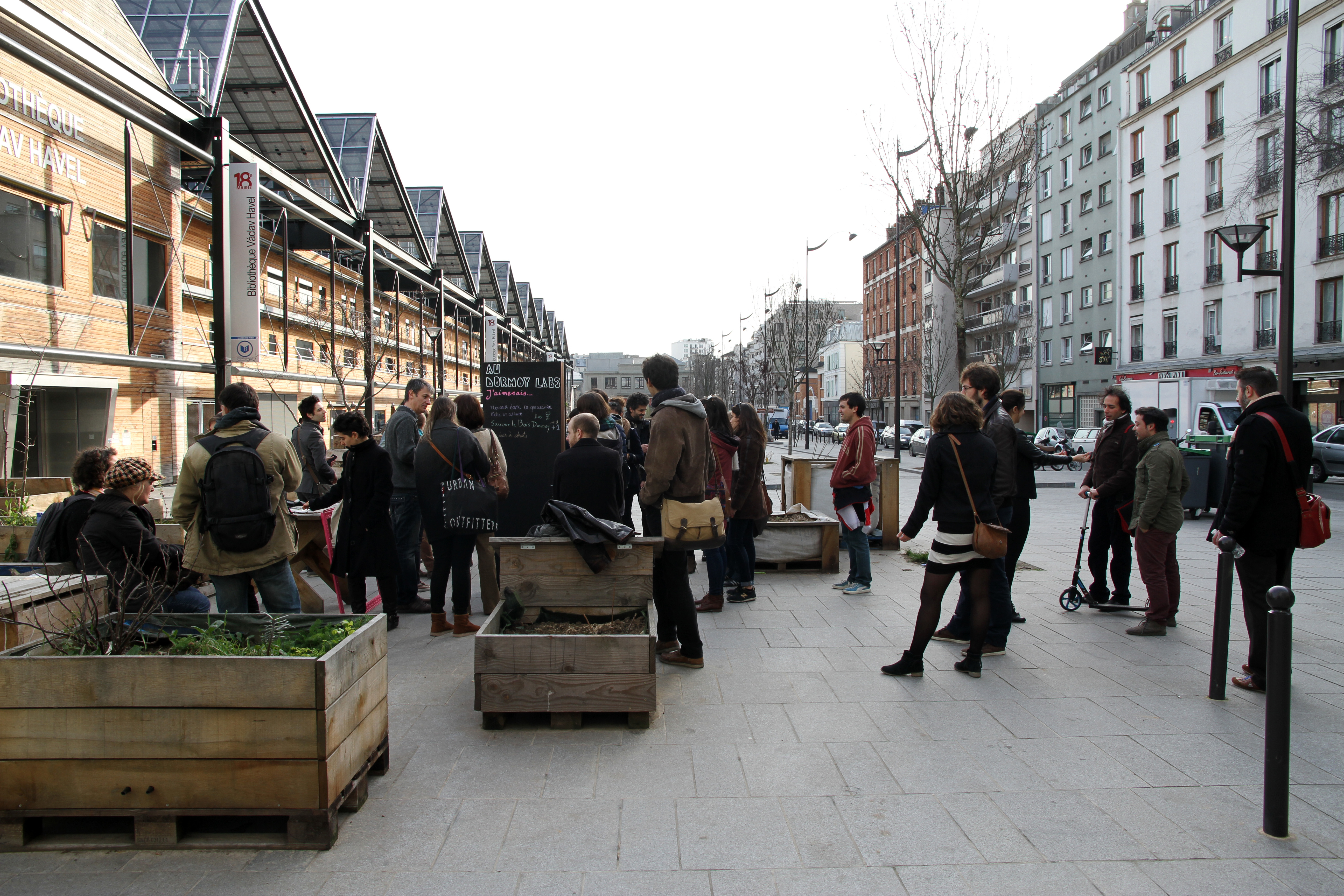 Esplanade Nathalie-Sarraute, Paris, France.